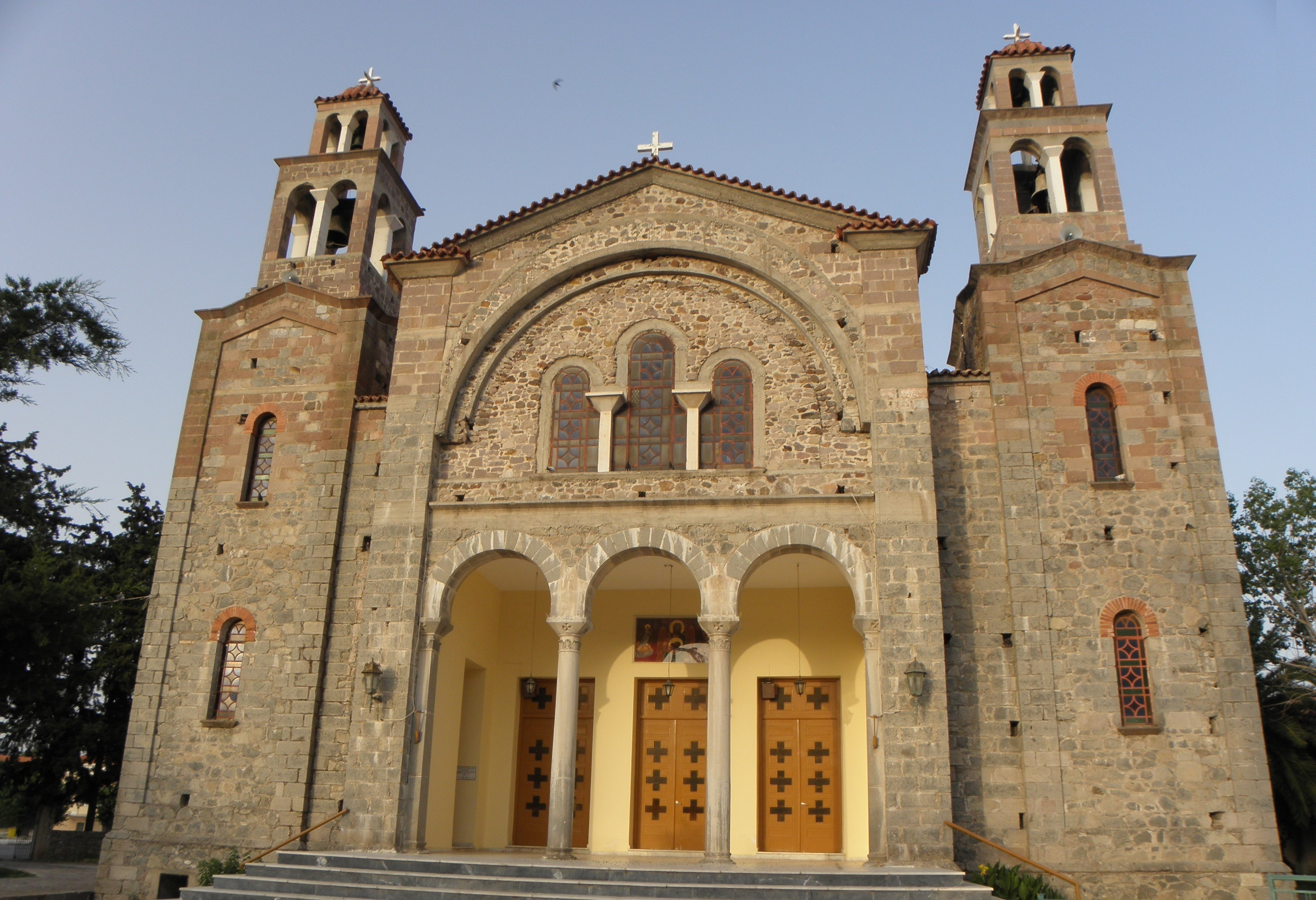 Katedrála v Kalloni, Lesbos